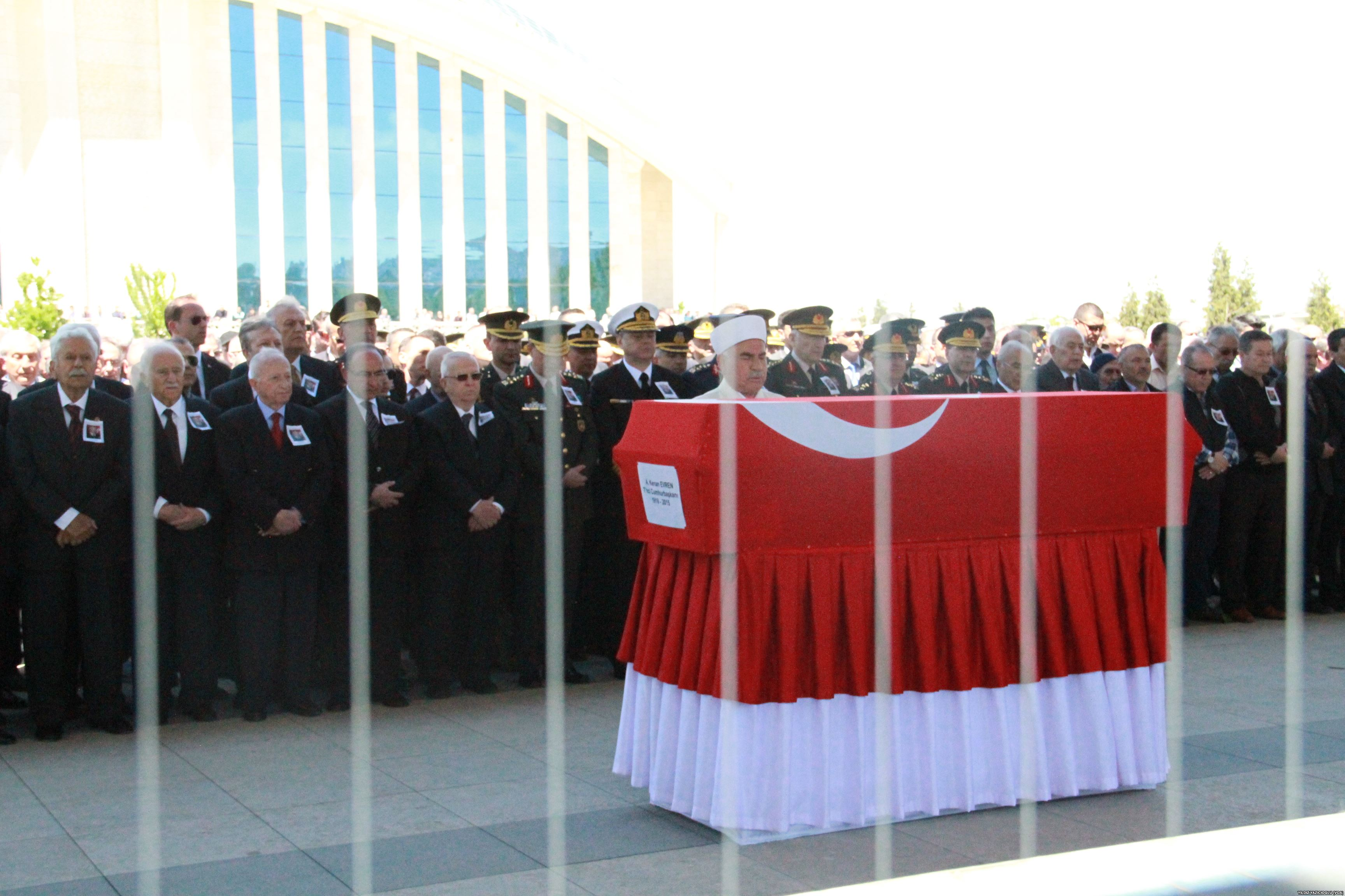 Kenan Evren'in 12 Mayıs 2015 tarihindeki cenazesinden bir kare.